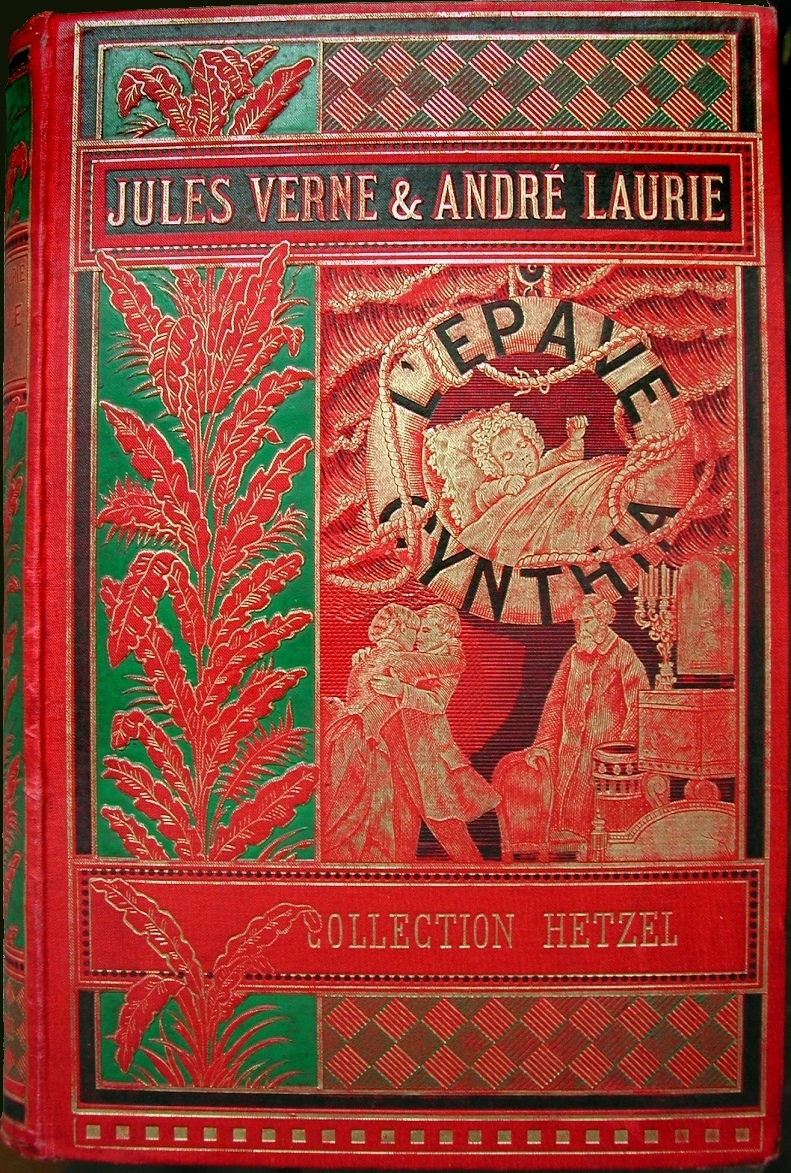 Cartonnage original de L'Épave du Cynthia de Jules Verne, éditions Hetzel.